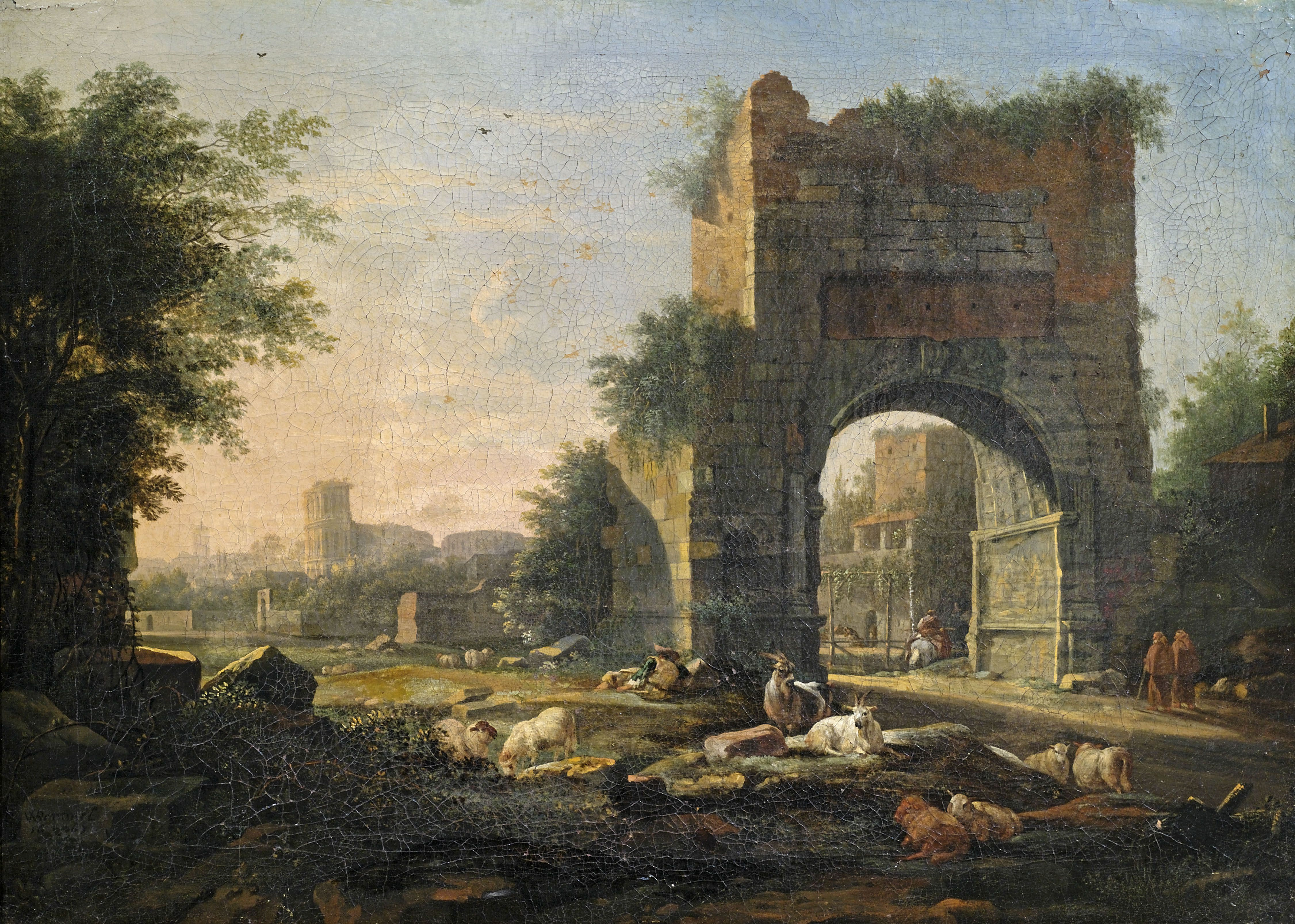 Römische Abendstimmung. Hirten am Drususbogen, im Hintergrund das Colosseum und der Turm von S. Francesca Romana.